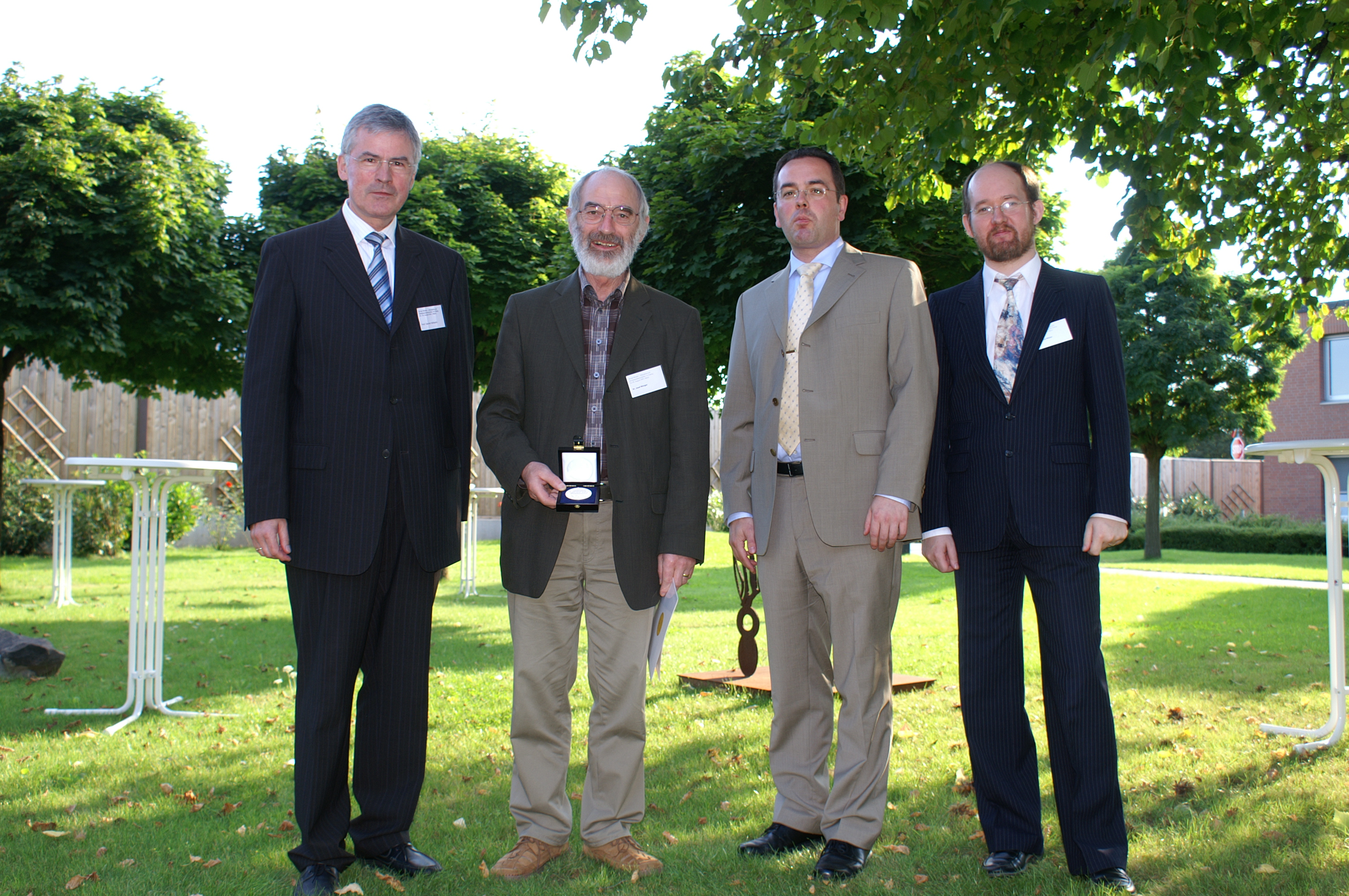 Pictures from Wikipedia Academy Mainz 24./25. August 2007 Josef Winiger präsentiert die Zedler-Medaille left to right: Professor Gernot Wilhelm (Akademie der Wissenschaften und der Literatur), Dr. Josef Winiger (Preisträger der Zedler-Medaille), Frank Schulenburg (Wikimedia Deutschland), Dr. Markus Müller (Wikimedia Deutschland)]